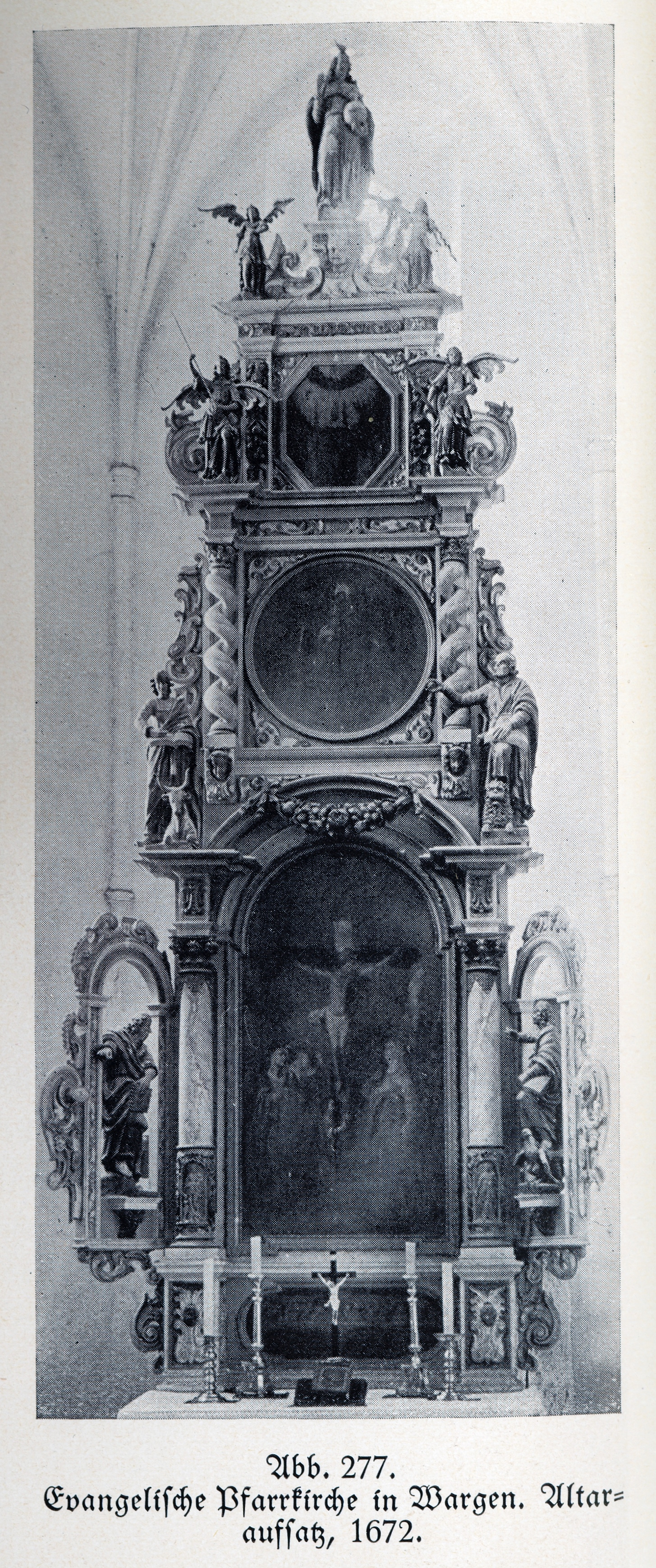 Wargen, Evangelische Pfarrkirche, Altaraufsatz, 1672, Bildhauer Joh. Pfeffer (zugeschrieben)